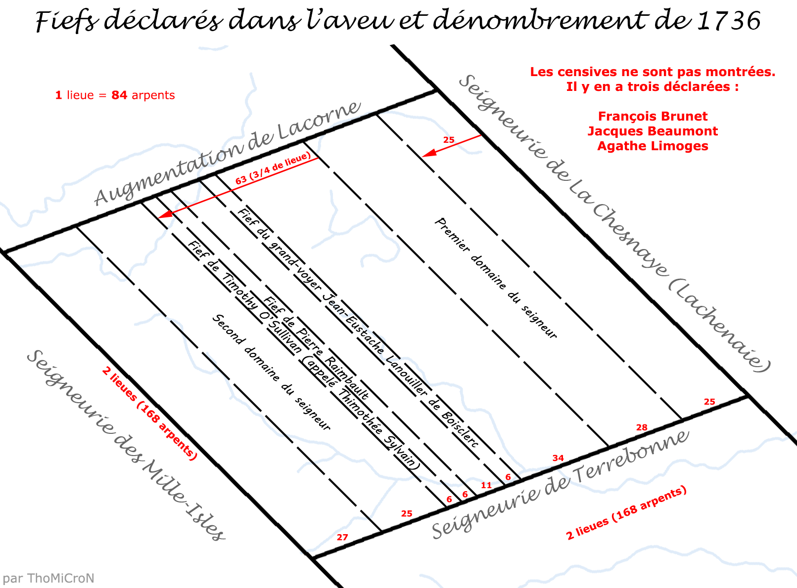 Carte hypothétique des anciens fiefs dans l'augmentation des Plaines, dans la seigneurie de Terrebonne. Tous ces fiefs cesseront d'exister en 1750, sauf le fief Sainte-Claire.